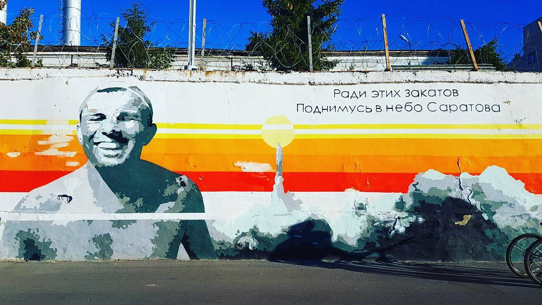 Граффити на Набережной Космонавтов г.Саратова